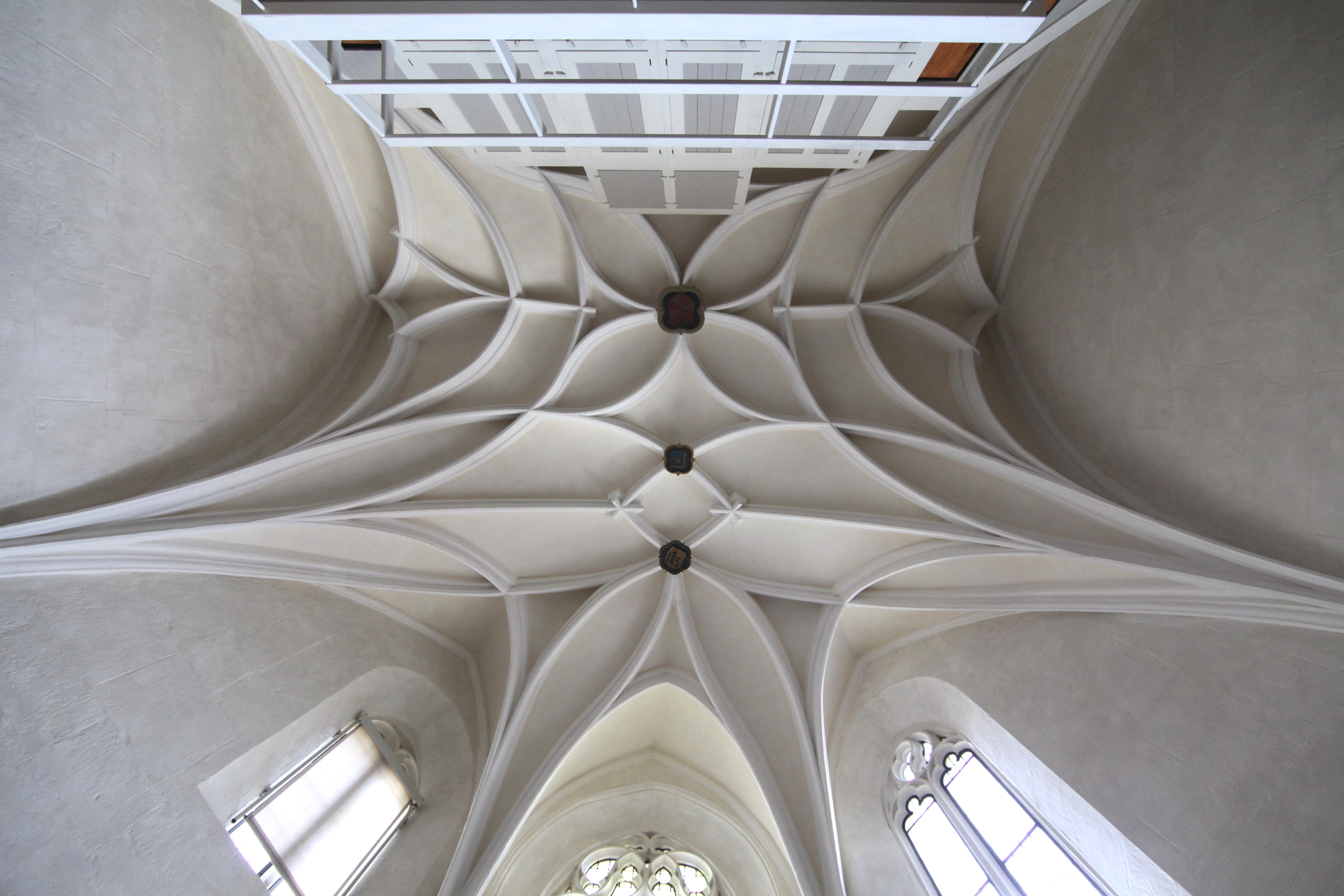 Westchorgewölbe Morizkirche Coburg